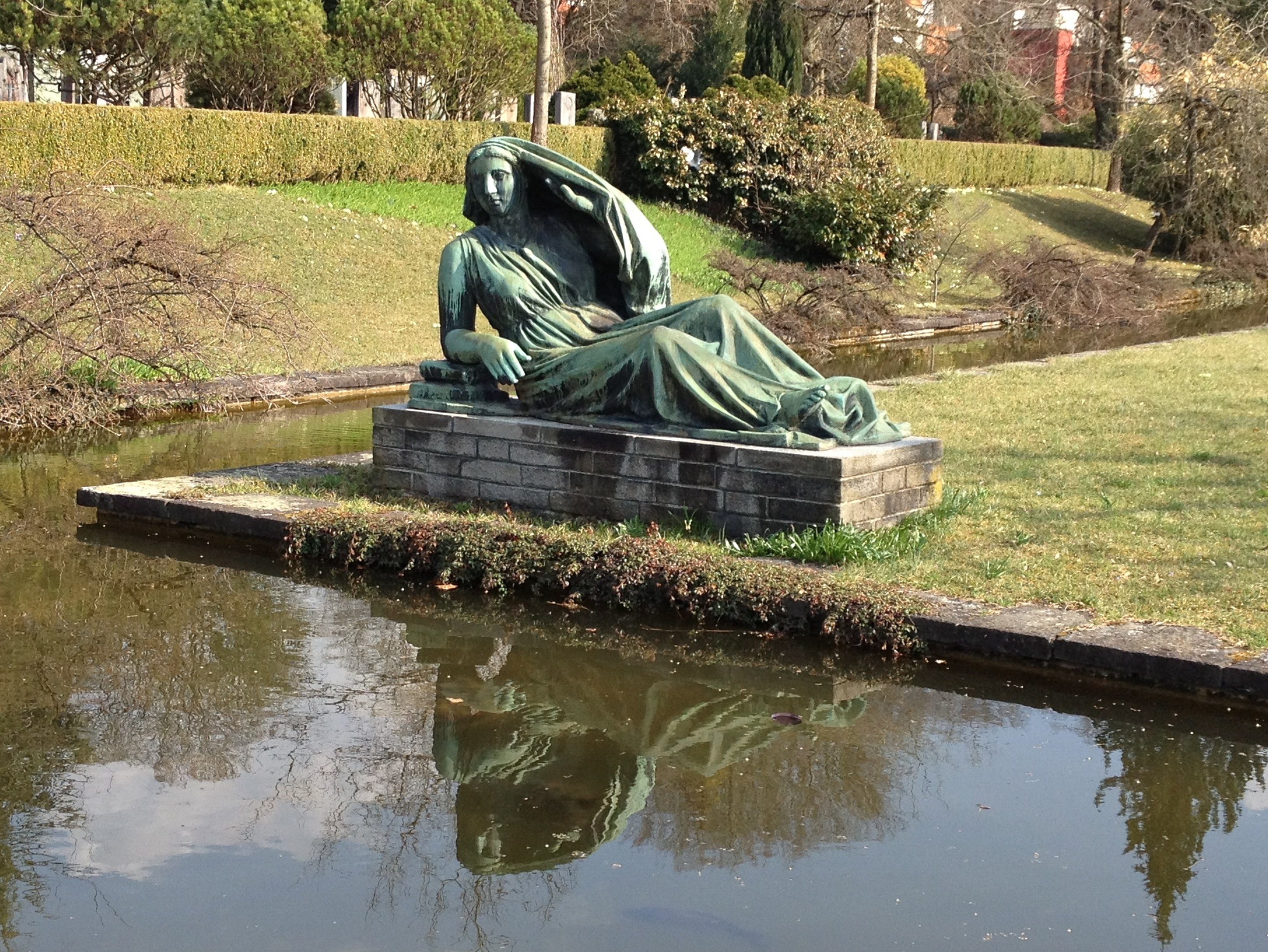 Friedhof Enzenbühl in Zürich Teich mit Plastik "Sich verhüllende Frau" von Franz Fischer